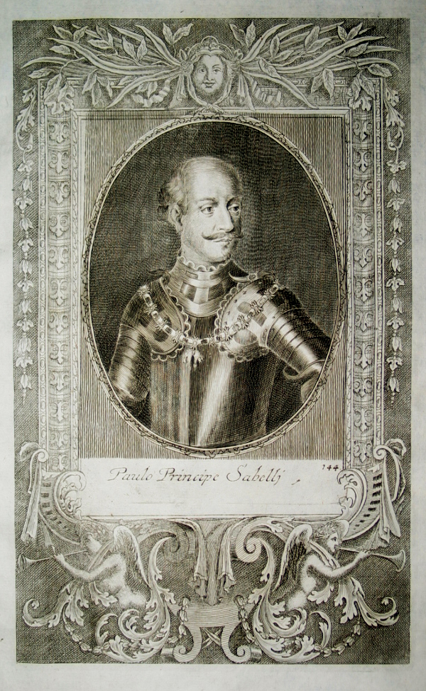 Friedrich Herzog von Savelli (gest. 1649): Paulo Principe Sabelli. Kaiserlicher Feldmarschall.